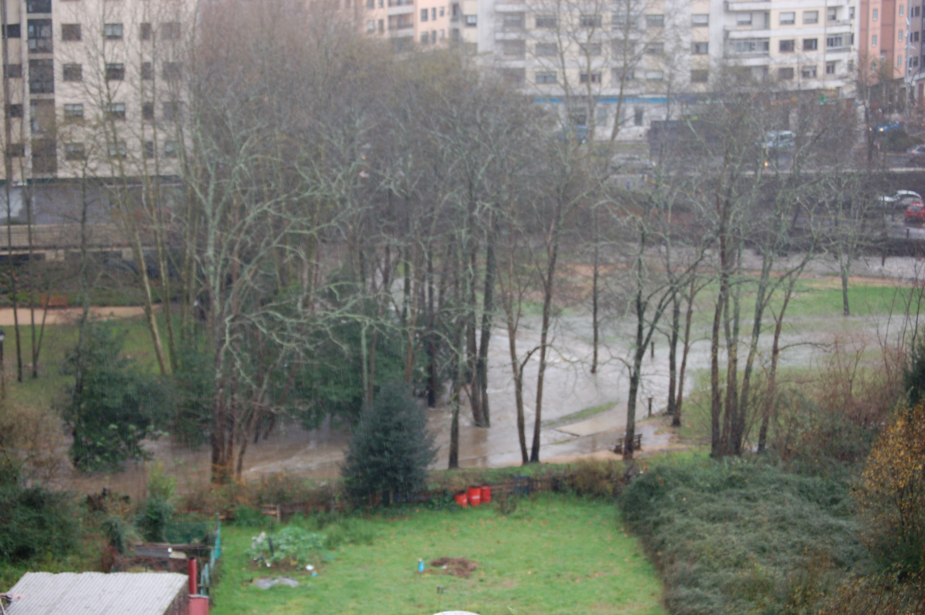 Desbordamento do río dos Gafos preto do Gorgullón (Pontevedra).